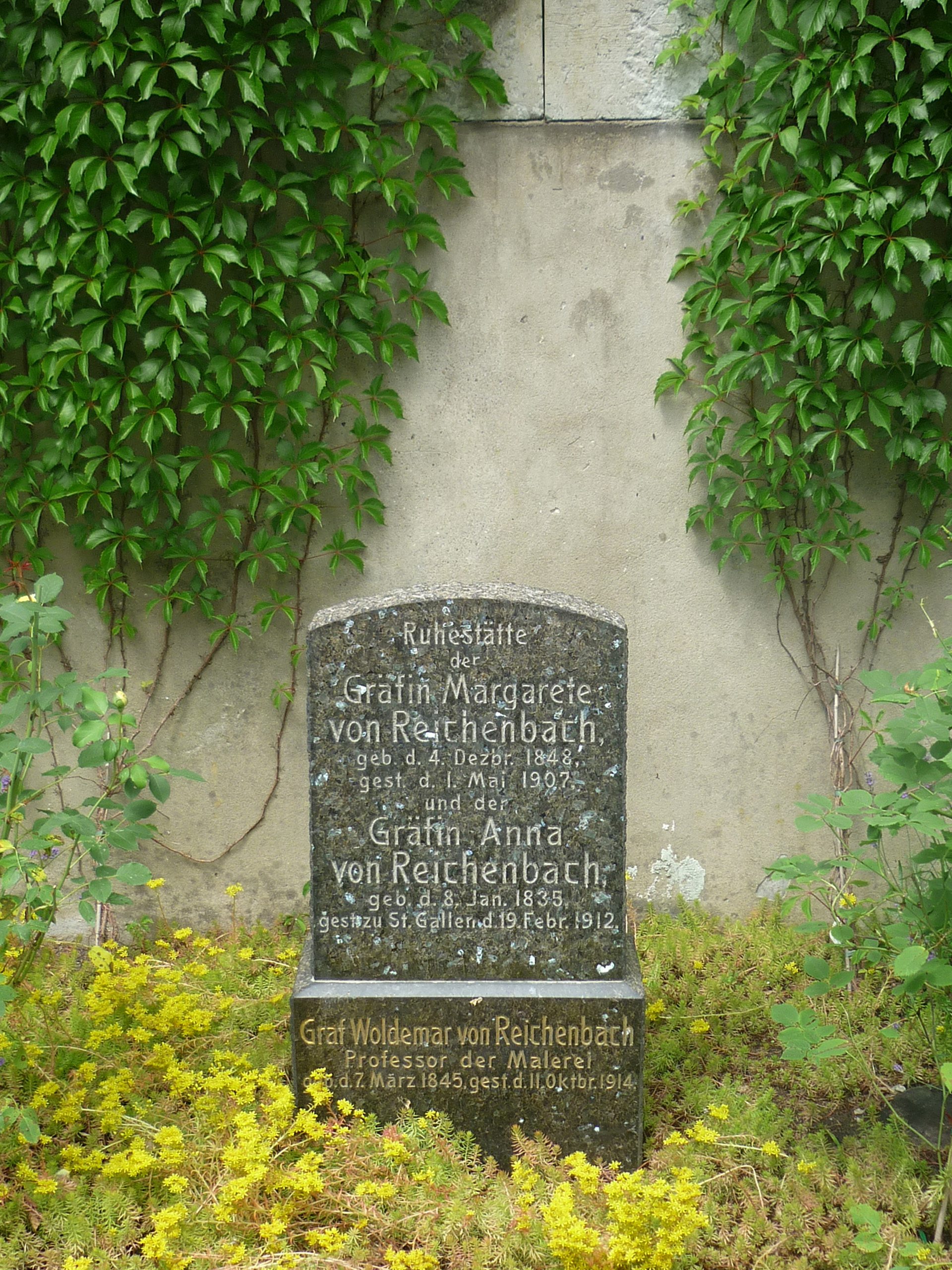 Loschwitzer Friedhof in Dresden-Loschwitz: Grabstätte Graf Woldemar von Reichenbach (1846–1914), Maler